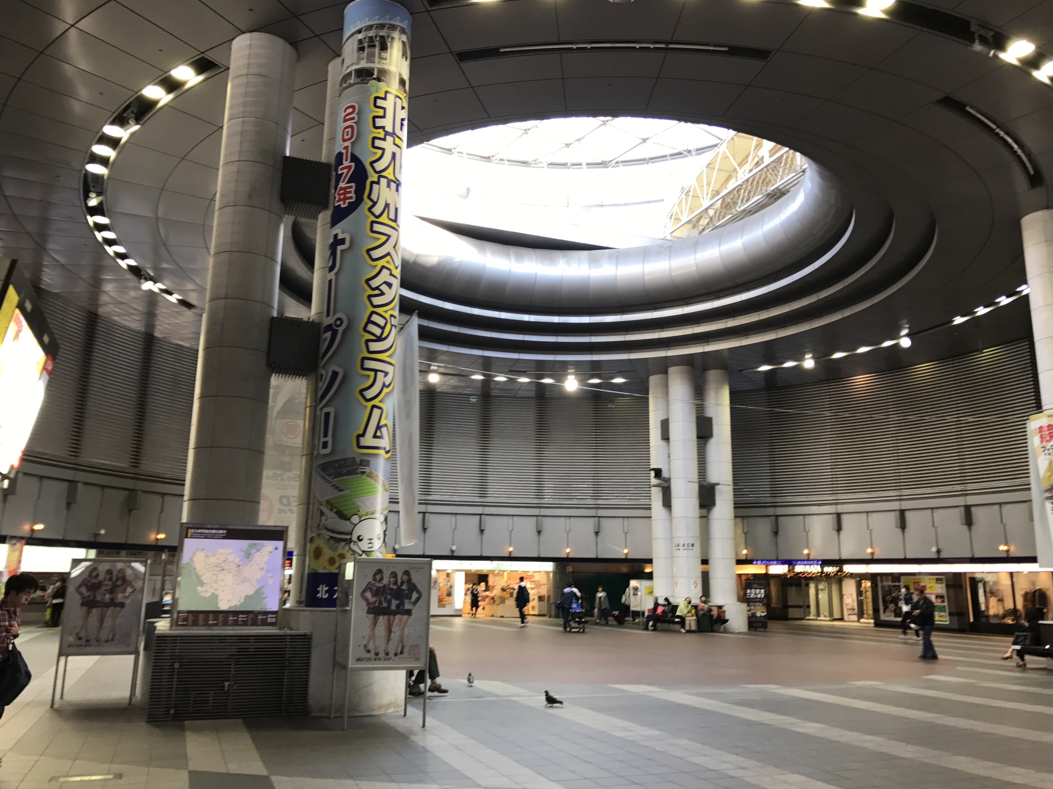 小倉駅(JR)の内観